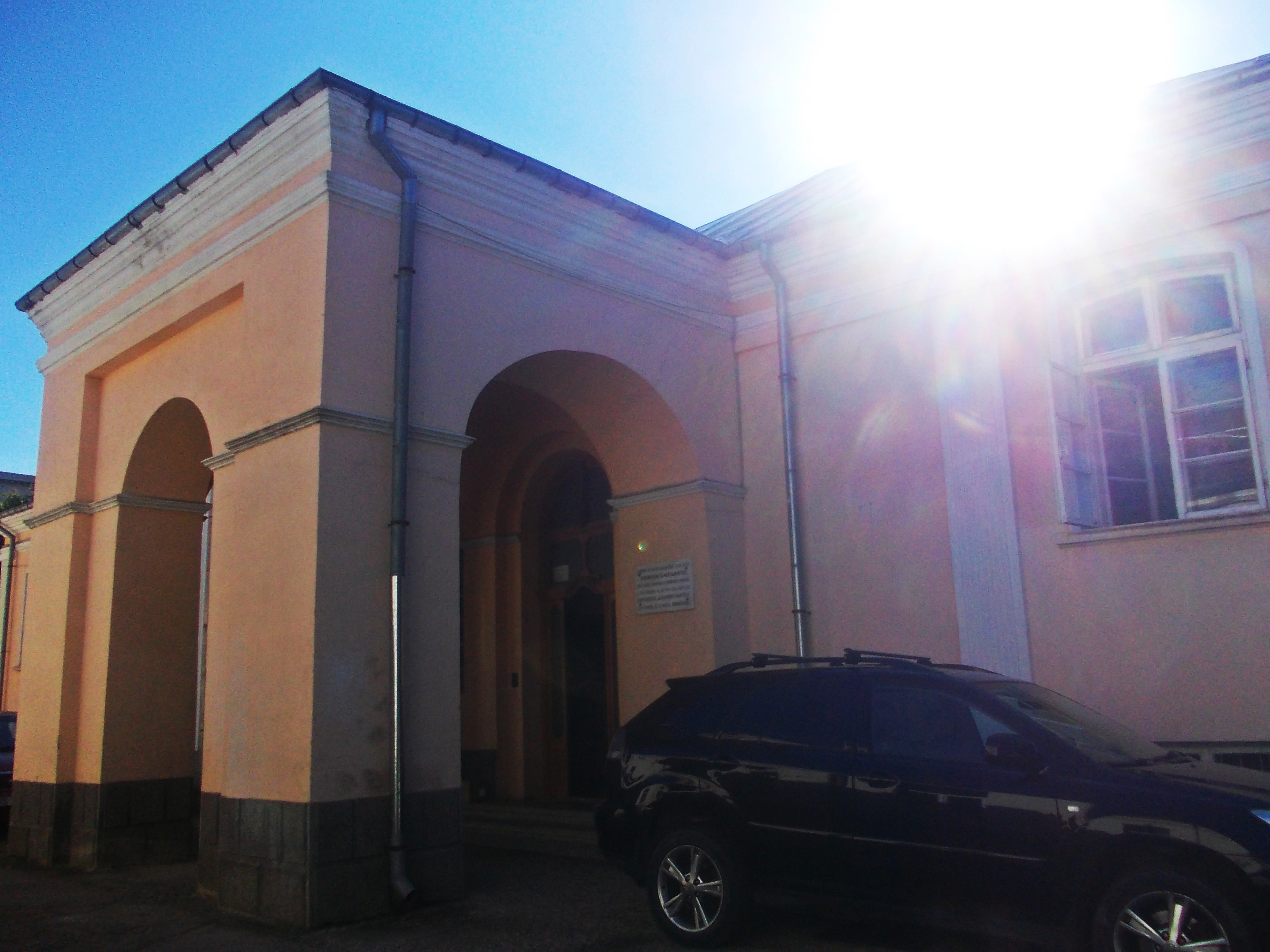 municipiul Iași, bd. Carol I 24